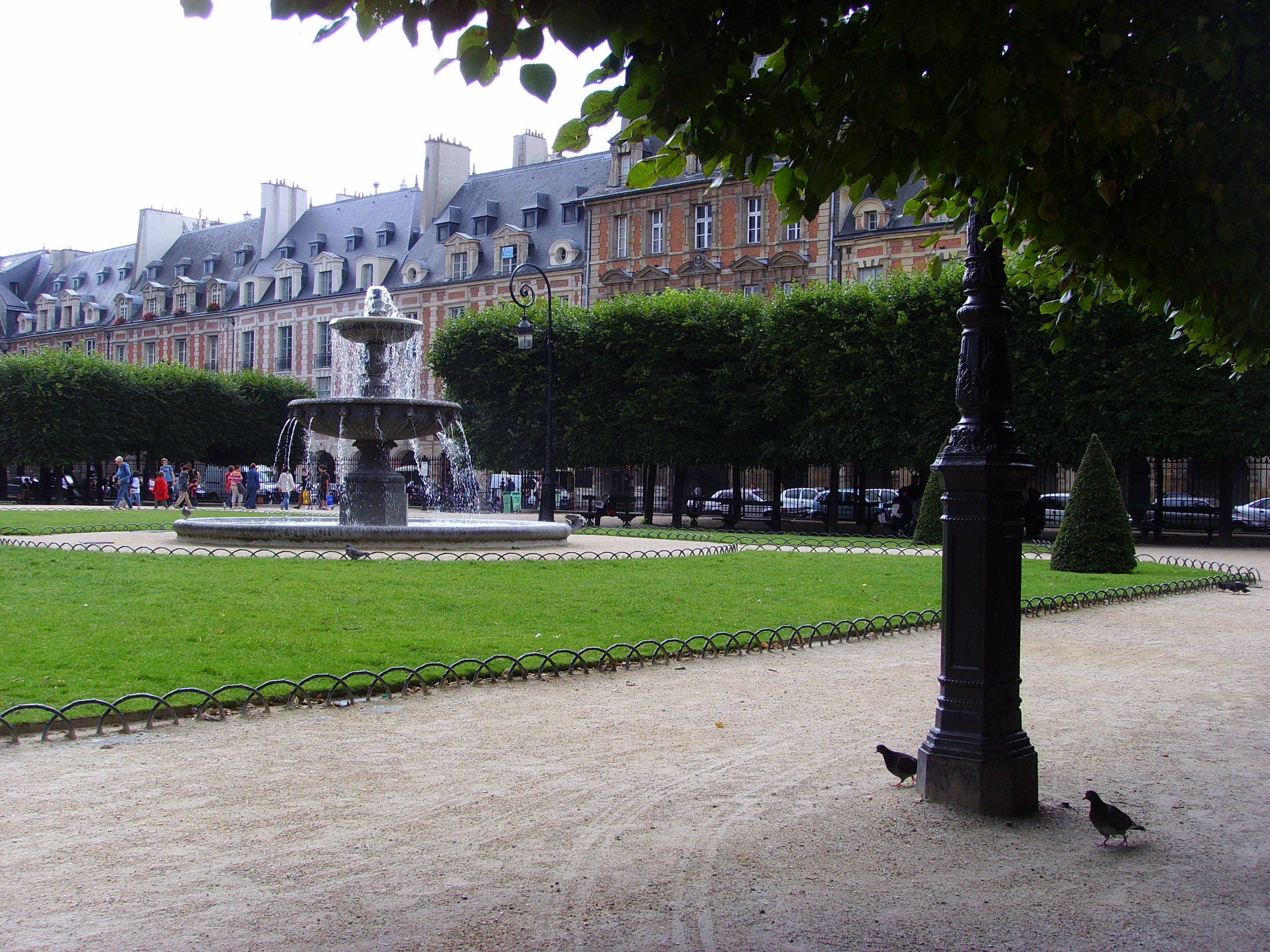 Place des Vosges, Paris